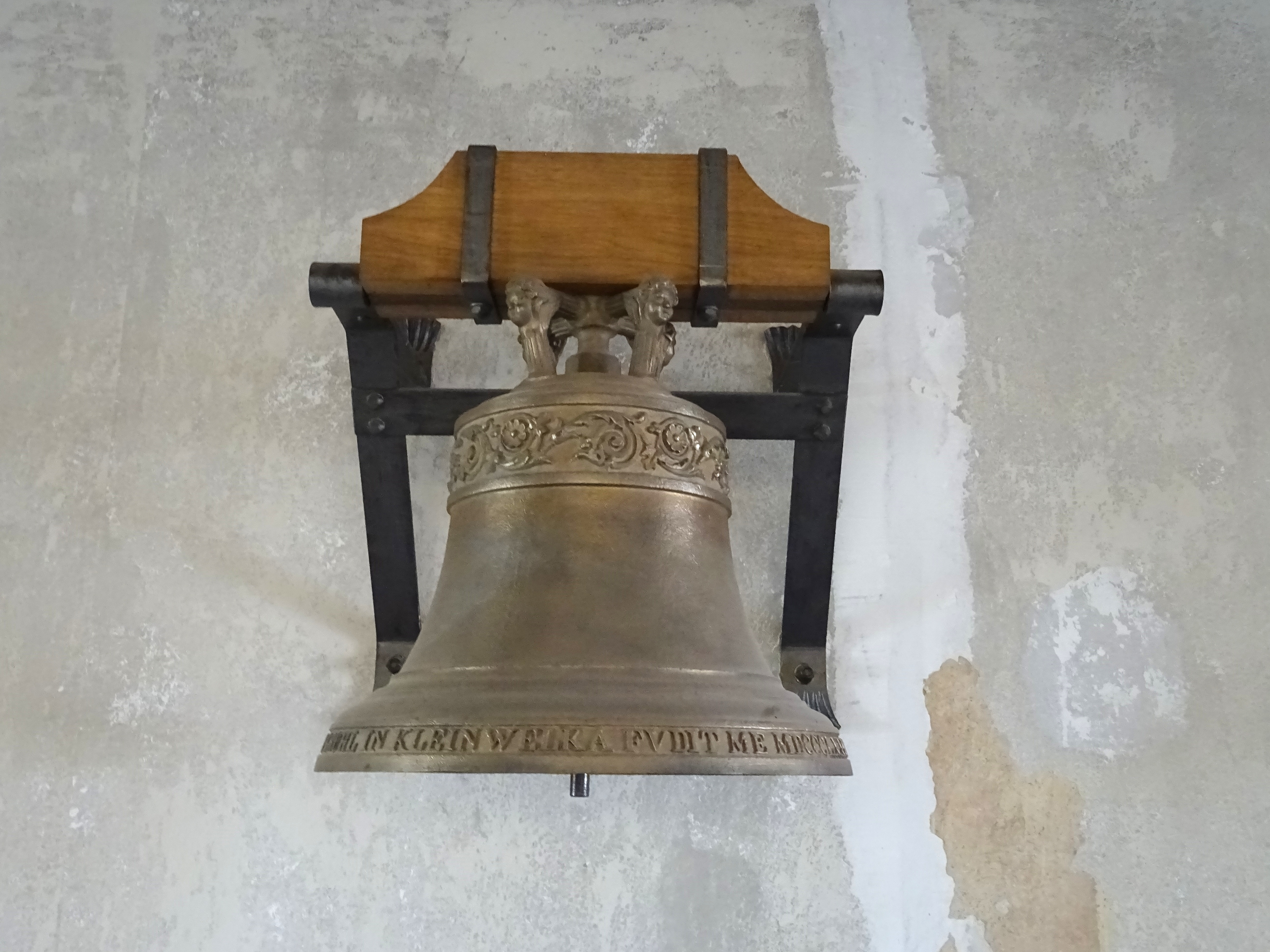 Katholische Kirche in Radeberg, erbaut von 1882 bis 1883 in neogotischen Stil. Derzeit finden Renovierungsarbeiten statt (21.03.2019). Die verbliebene Marienglocke bekam im Jahr 1983 einen Ehrenplatz in der Kirche nach der Restaurierung und befindet sich noch heute an der Kirchenrückwand.